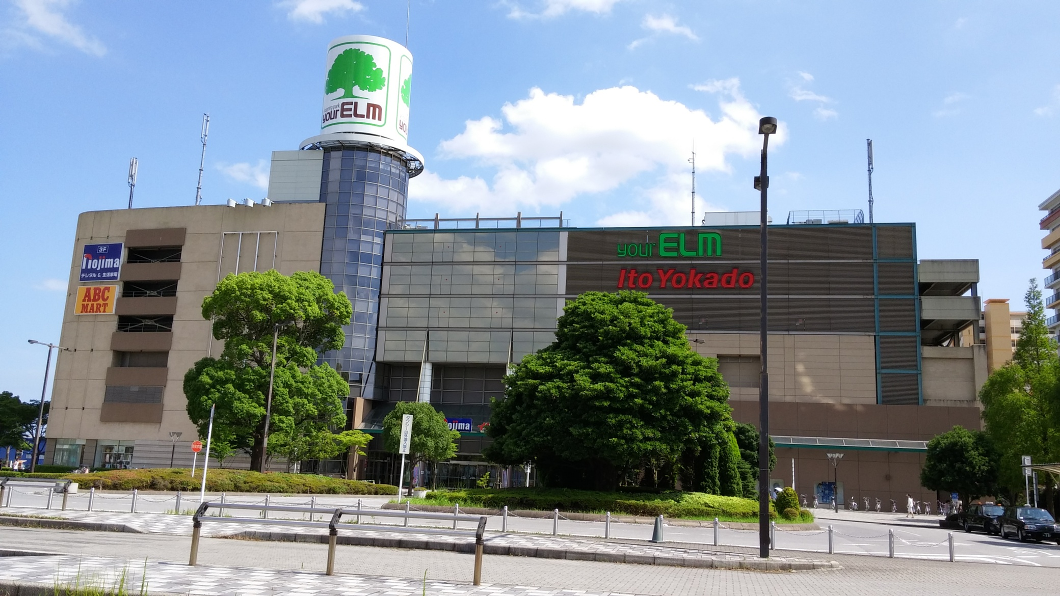 公津の杜駅バス停より撮影